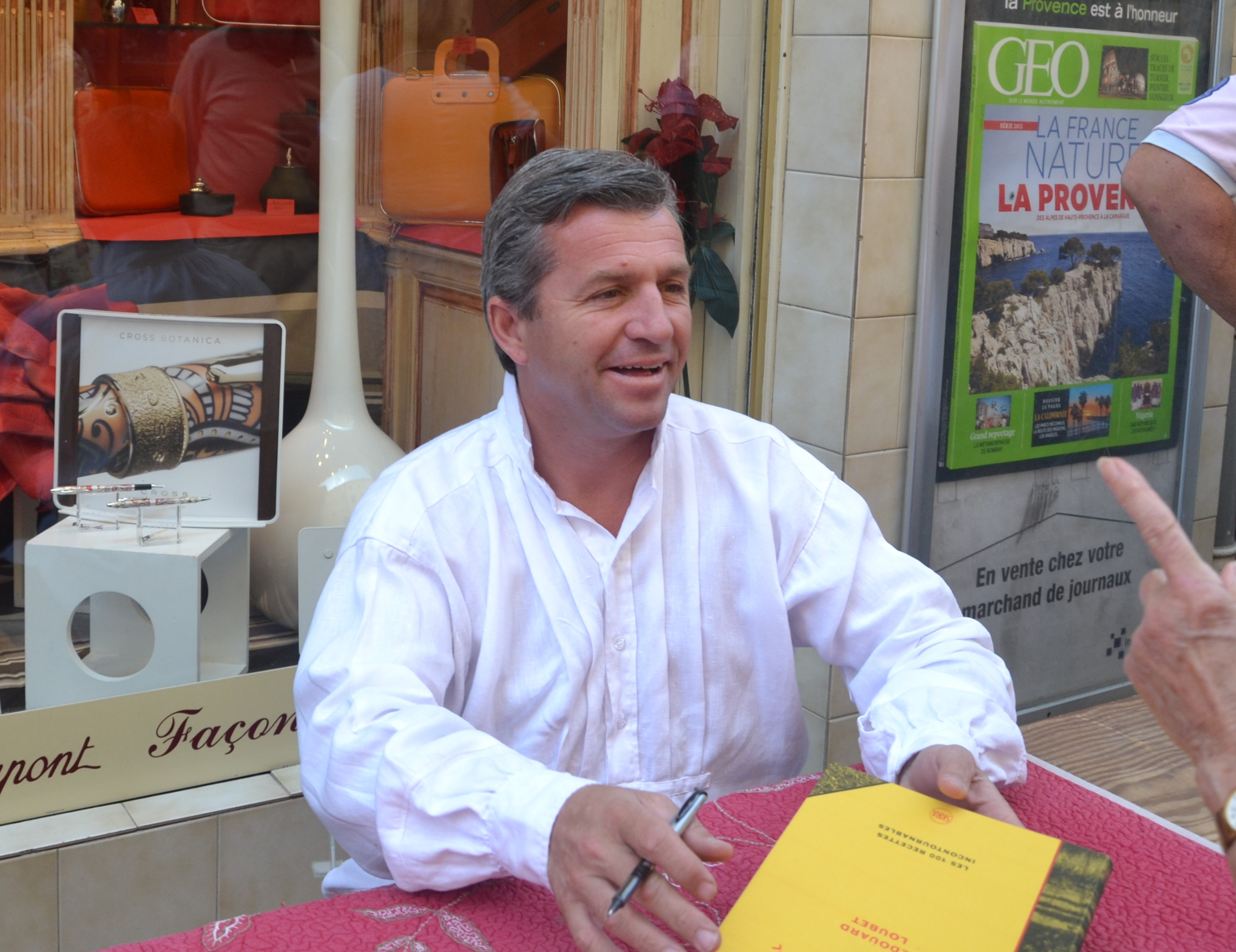 Edouard Loubet lors de la signature de son livre, " le cuisinier provençal ", à Carpentras